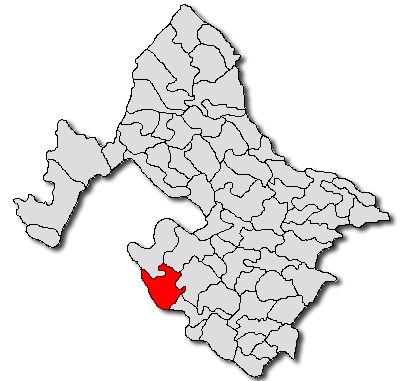 Categorie:Hărţi ale judeţului Mehedinţi